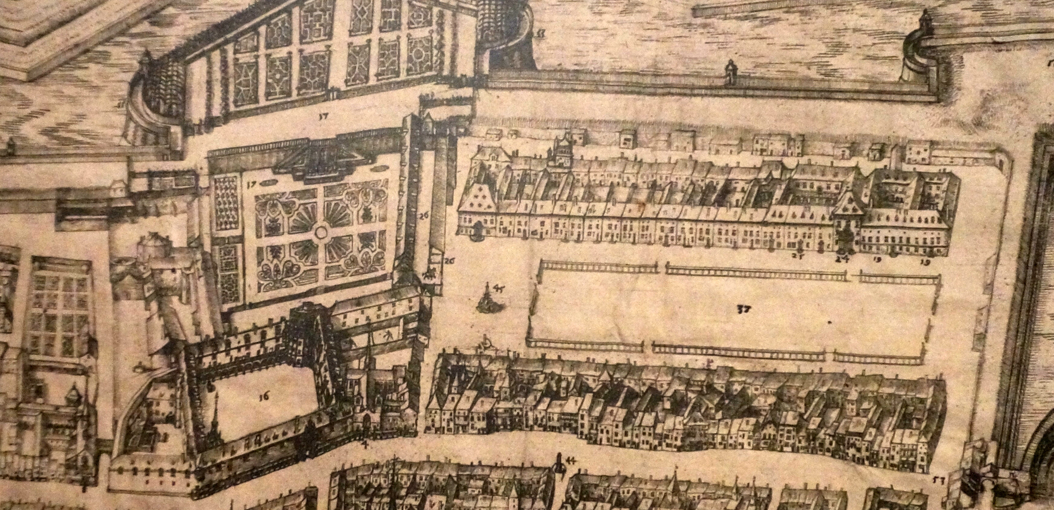 Présenté au Musée Lorrain. 4 : l'insigne église collégiale de st-George, 16 : hôtel ducal, 17 : jardins de l'hôtel ducal, 19 : hôtel de salm, 26 : carrière à piquer et dresser chevaux, en partie couvert et en partie découverte, 24 : la grande escuyerie, 25 : la petite escuyerie, 37 : place à faire jouste, tournois & coures de bague, 44 : fontaine du viel hospital, 45 : fontaine de la neuve rue, 53 : porte st-Nicolas entre les deux villes, 57 : le bastion d'Haussonville.